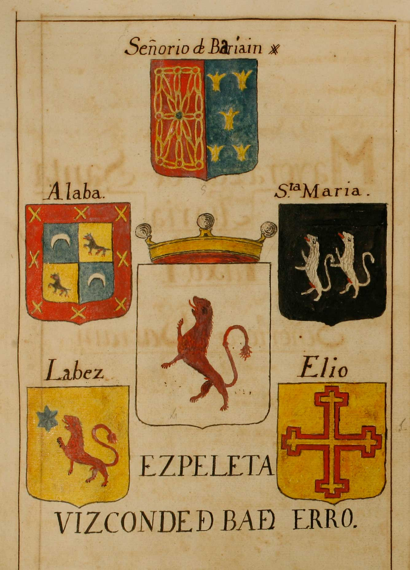 Armas del Vizconde de Val de Erro en 1775 "Inventario de Papeles y Escrituras de la Casa de Ayanz y sus Mayorazgos de Santamaría y Val de Erro. arreglados el Año de 1775. tomo 2"